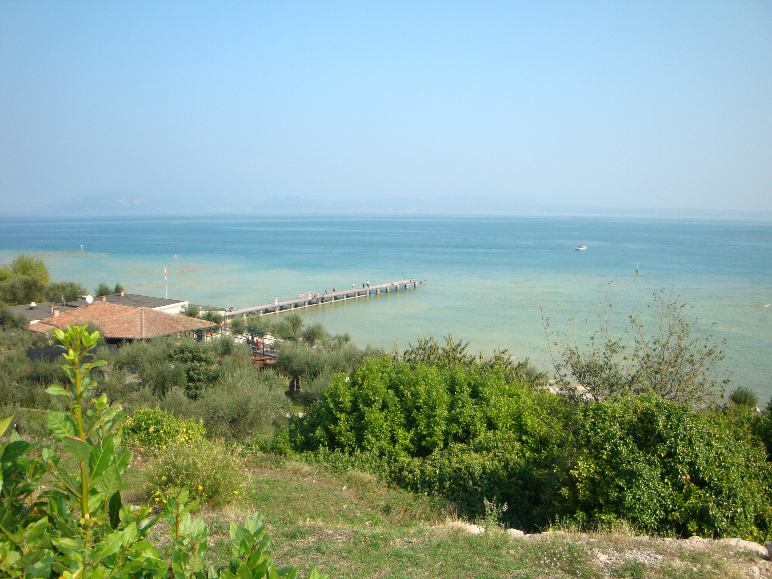 Il Lago di Garda visto da Sirmione